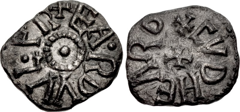 Esceta de Erdúlfo da Nortúmbria